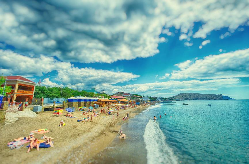 Город Судак